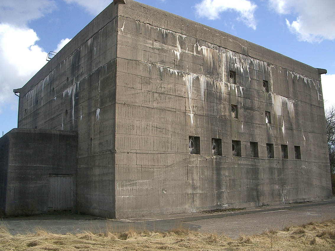 Truppenmannschaftsbunker 750 Emsstraße 1 in Wilhelmshaven